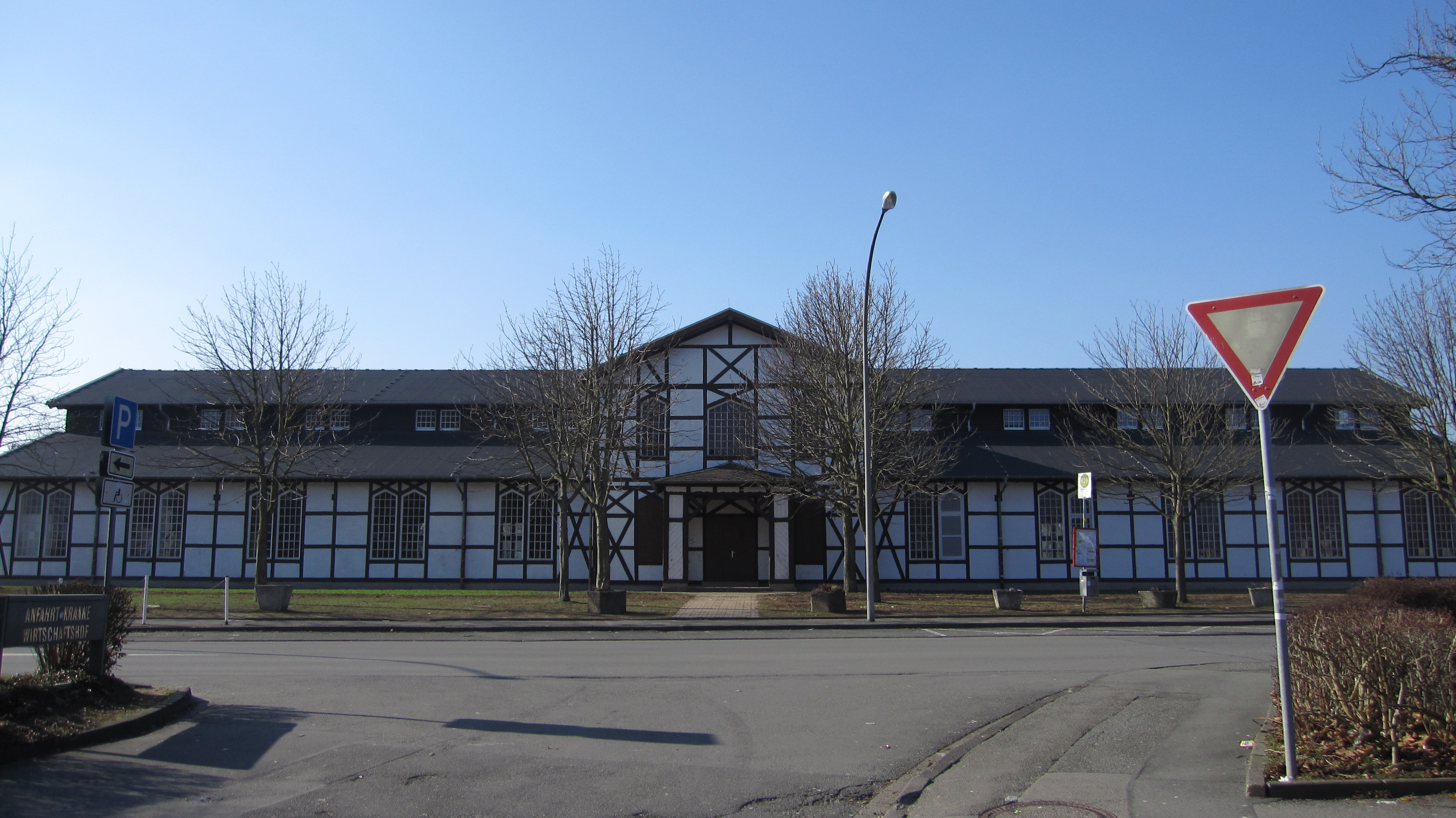 Die Warburger Stadthalle am Schützenplatz.